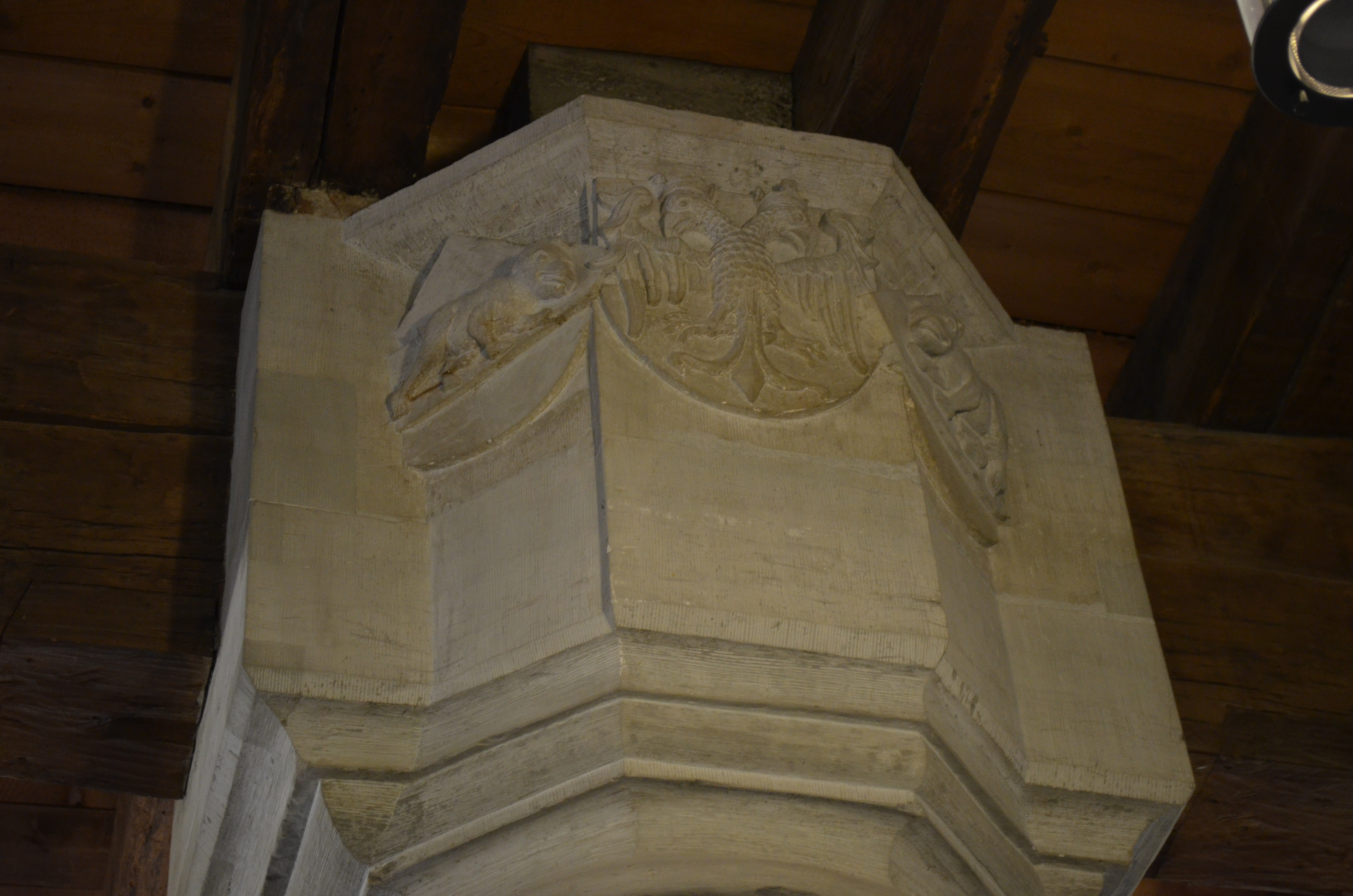 Bern, Rathaus, Halle, Kapitell